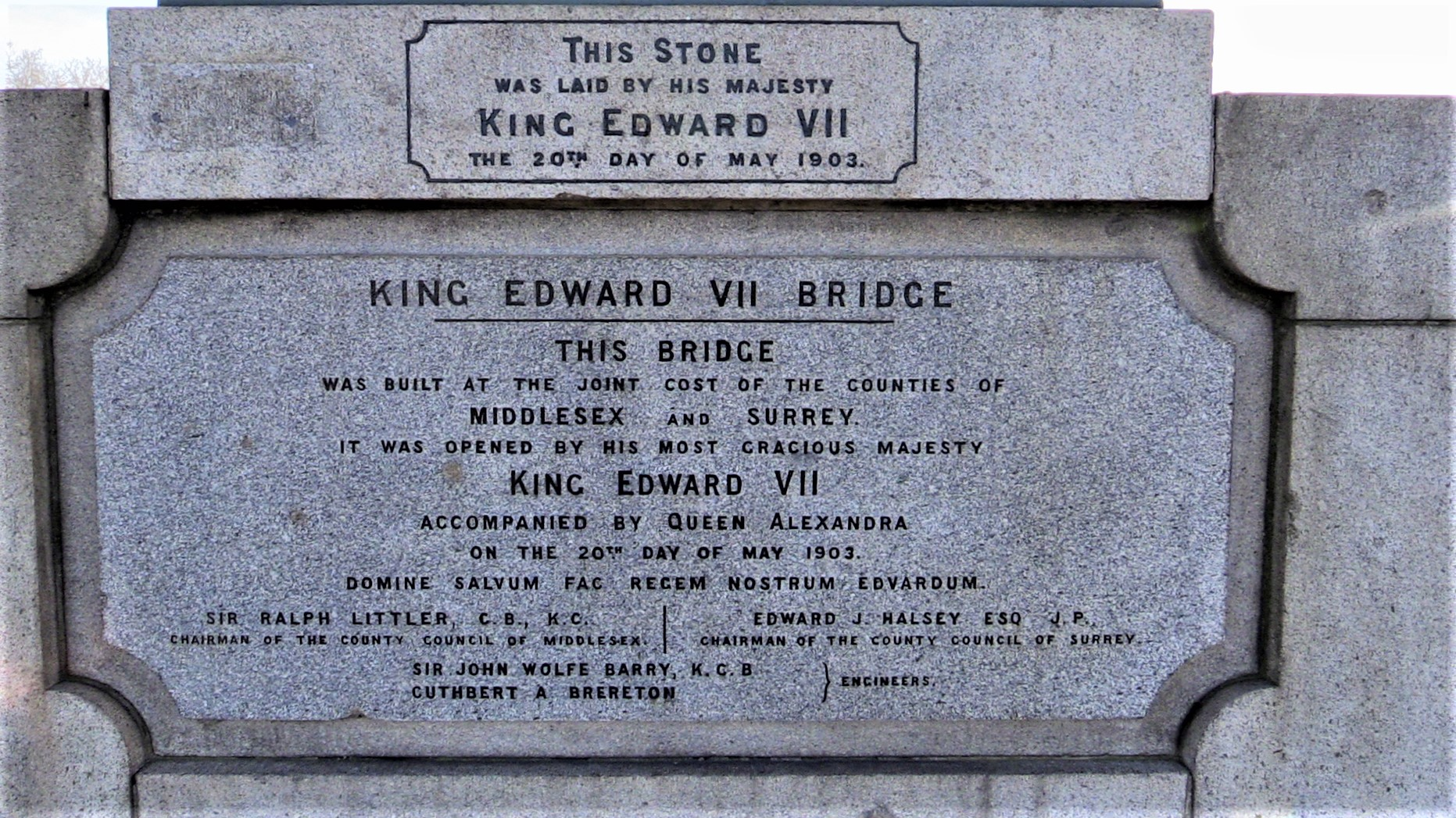 Аҧсшәа